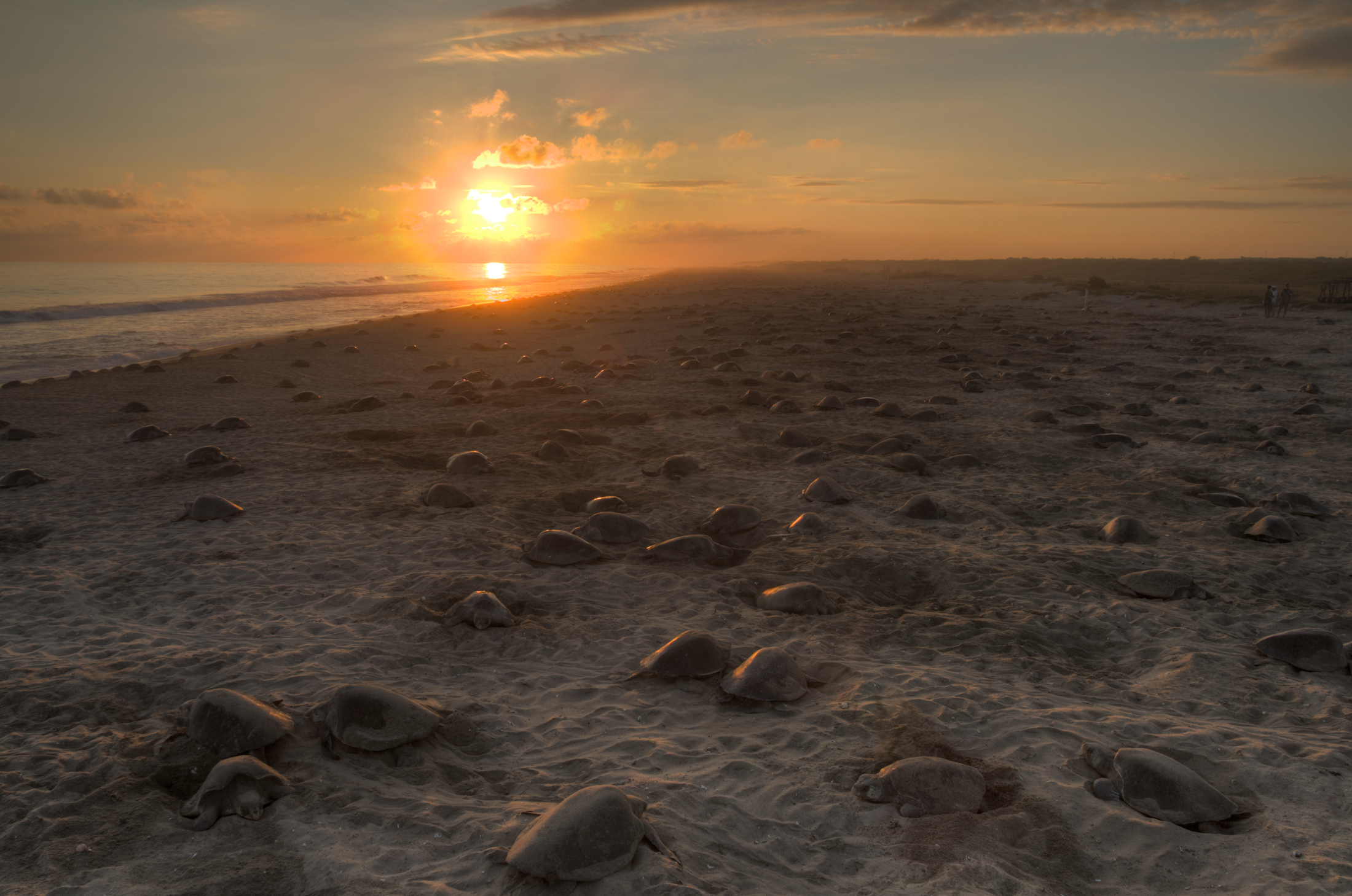 Turtles nesting on Escobilla, Oaxaca, Mexico